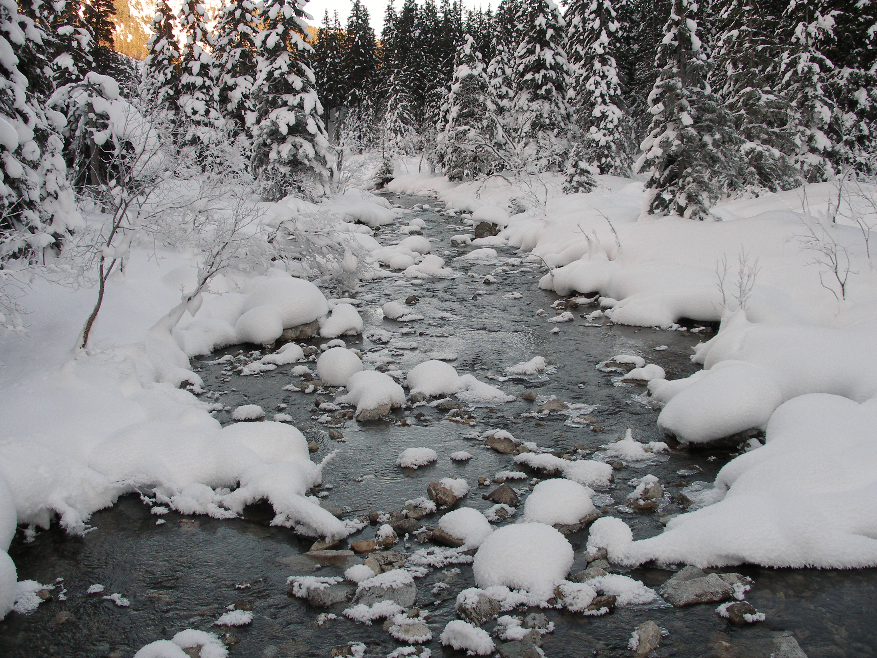 Rybi Potok zimą (widok z mostku, ze szlaku biegnącego wokół Morskiego Oka)